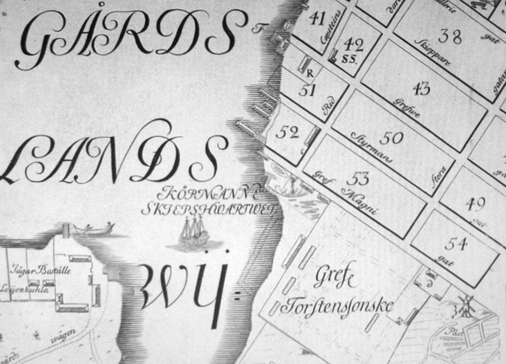 Del av Petrus Tillaeus karta visande Terra Nova skeppsvarv